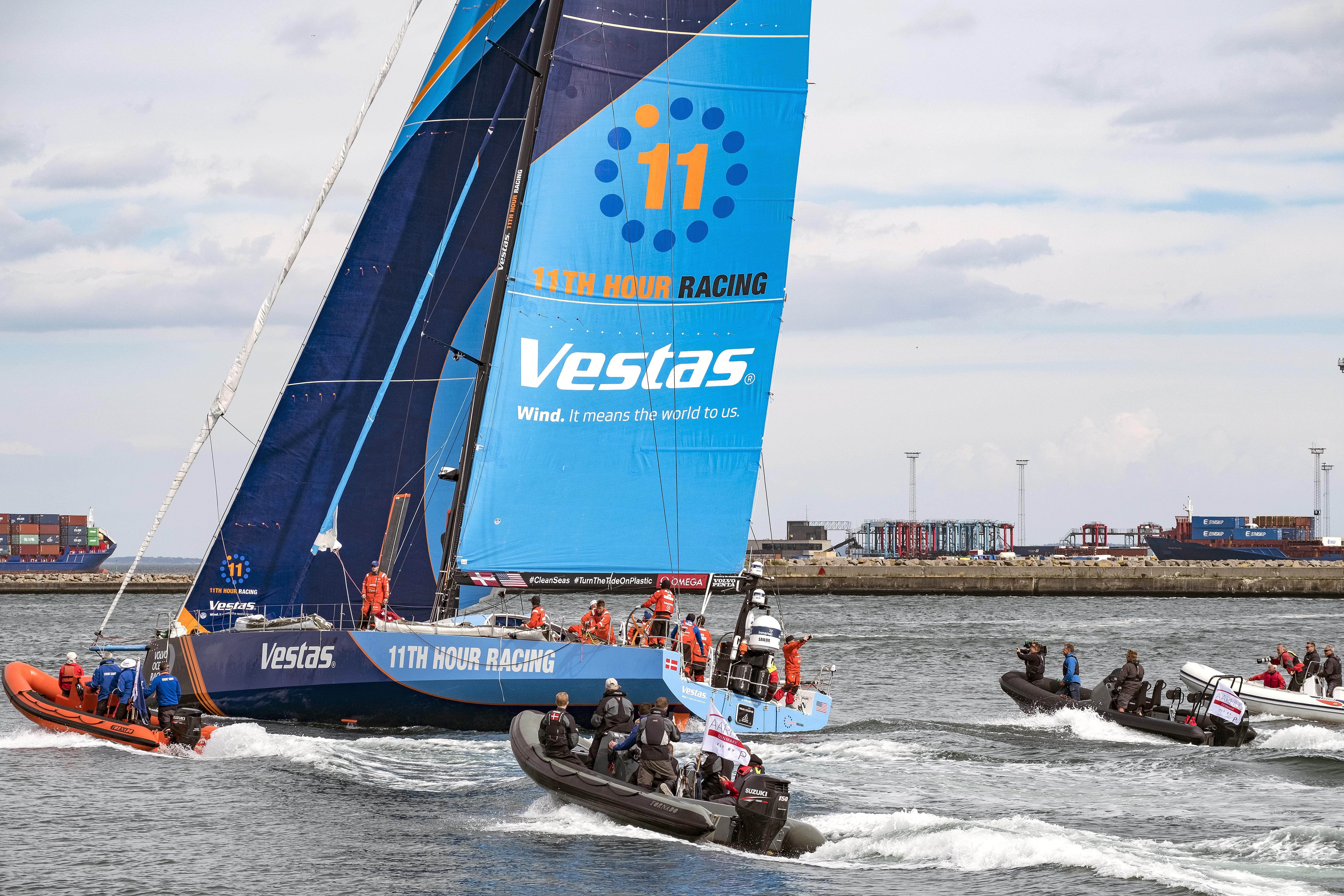 Den 22 juni 2018 besökte segeltävlingen Volvo Ocean Race för första gången Danmark när båtarna gjorde en så kallad fly by och vände inne i hamnen vid Dokk1 i Aarhus. På bilden båten som sponsras av danska vindkraftsjätten Vestas som har sitt huvudkontor i Aarhus...Photo: News Øresund - Johan Wessman.© News Øresund - Johan Wessman (CC BY 3.0)..Detta verk av News Øresund är licensierat under en Creative Commons Erkännande 3.0 Unported-licens (CC BY 3.0). Bilden får fritt publiceras under förutsättning att källa anges. .The picture can be used freely under the prerequisite that the source is given. News Øresund, Malmö, Sweden.News Øresund är en oberoende regional nyhetsbyrå som är en del av det oberoende dansk-svenska kunskapscentrat Øresundsinstituttet...